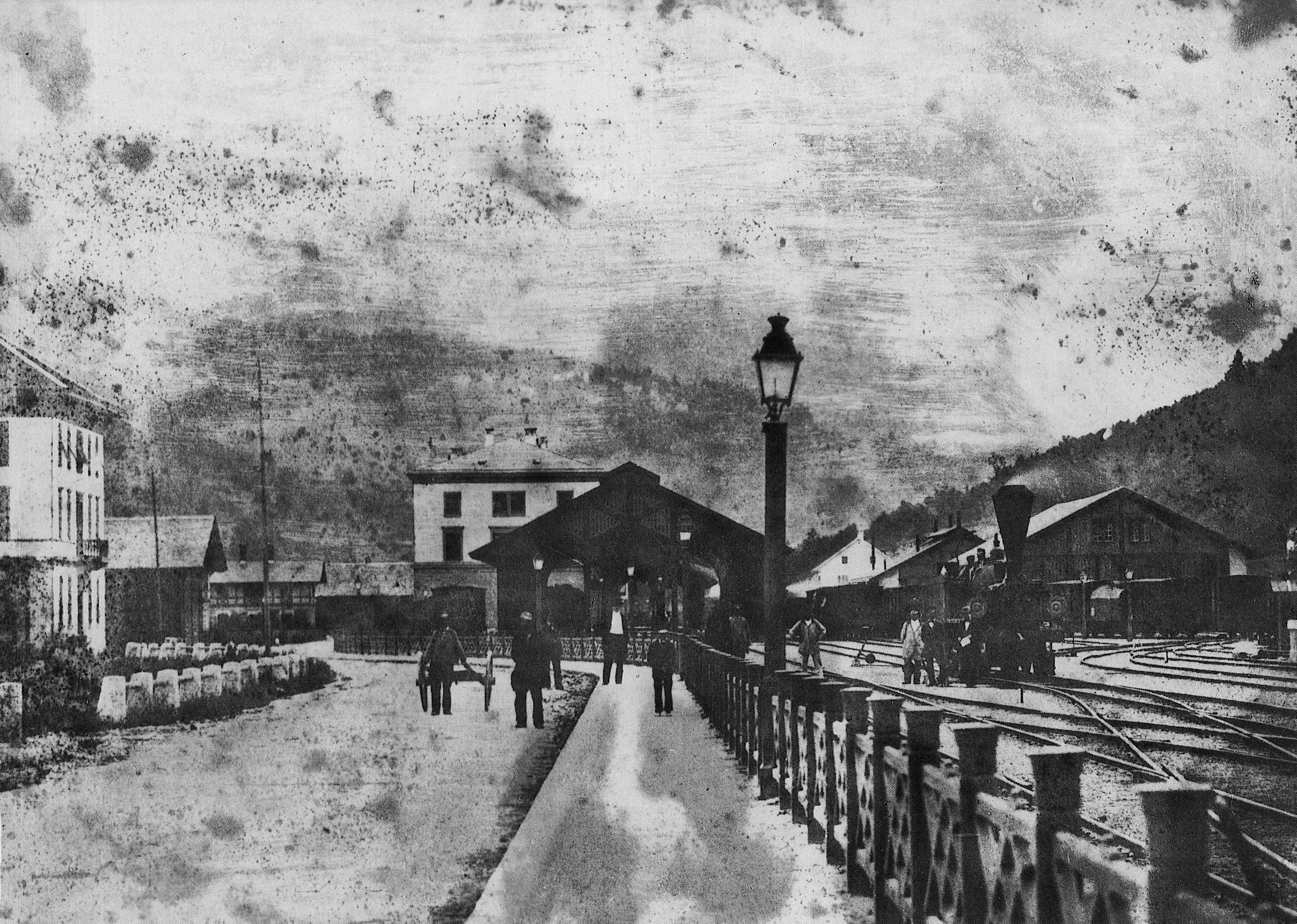 Bahnhof von Olten um 1860 mit einer der drei 1845 von Baldwin & Whitney in Philadelphia für die Königlich Württembergische Staats-Eisenbahnen gebauten, 1854 an die Schweizerische Centralbahn verkauften und dort zunächst für den Bahnbau verwendeten Schlepptender-Locomotiven des Typs C 2/3 (alle 1864 ausser Dienst gestellt, Abbruchjahre unbekannt).